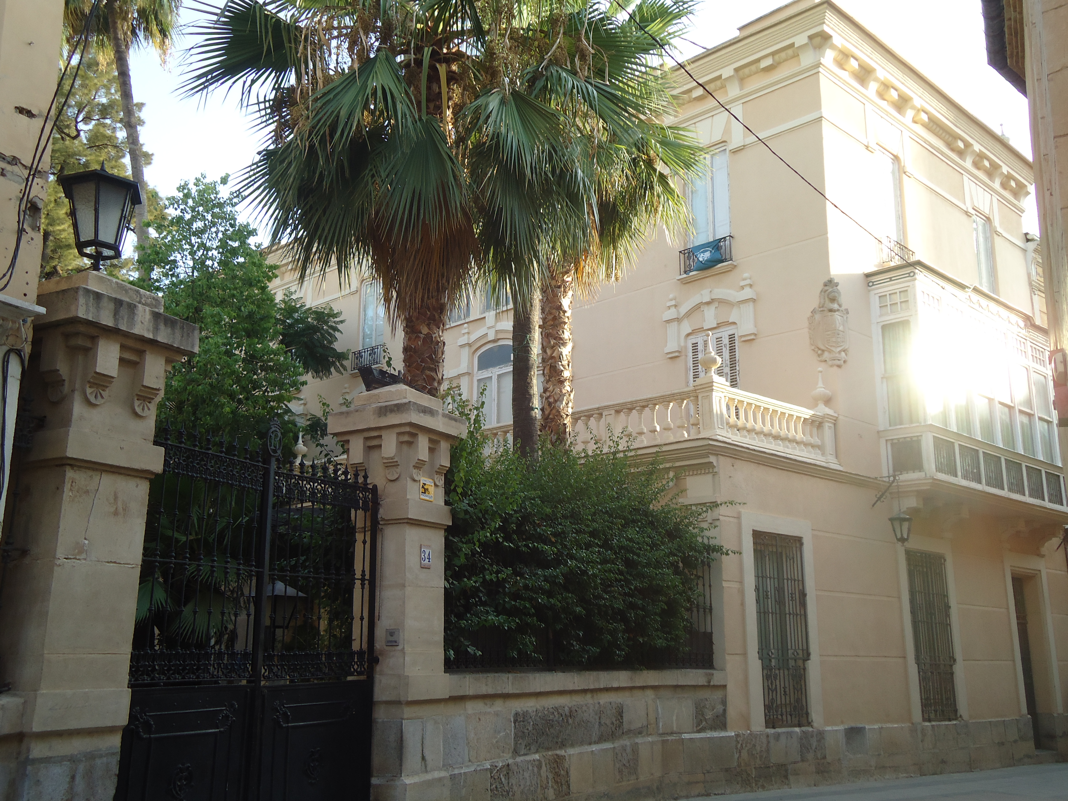 Palacio de la condesa de vía Manuel, en Orihuela (Comunidad Valenciana, España)